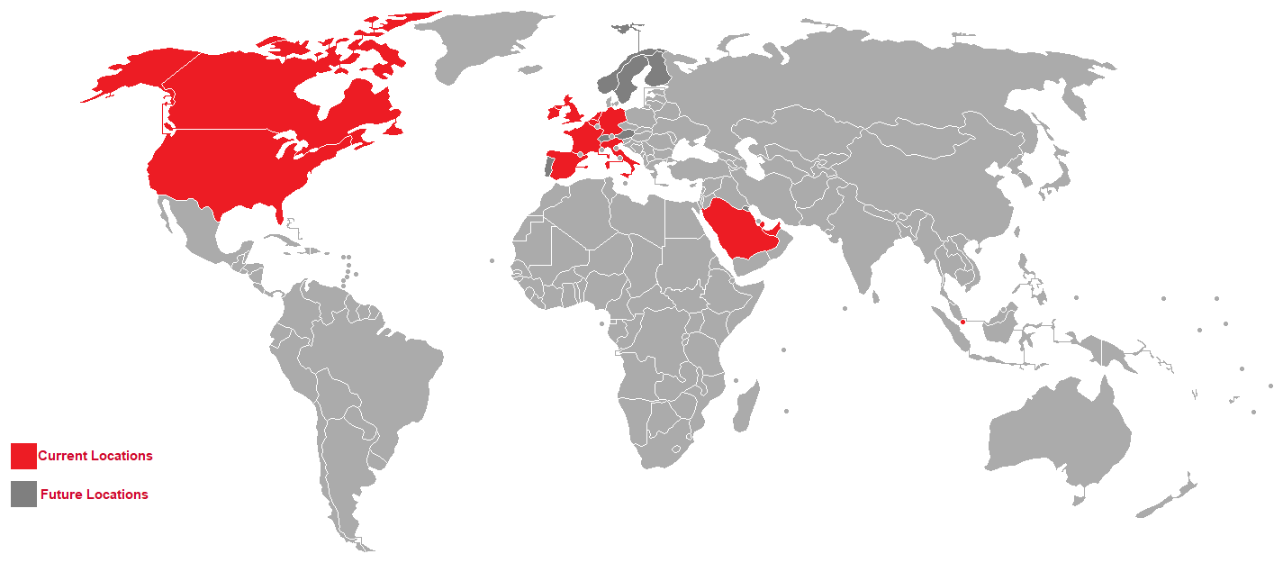 Paesi in cui è presente Five Guys